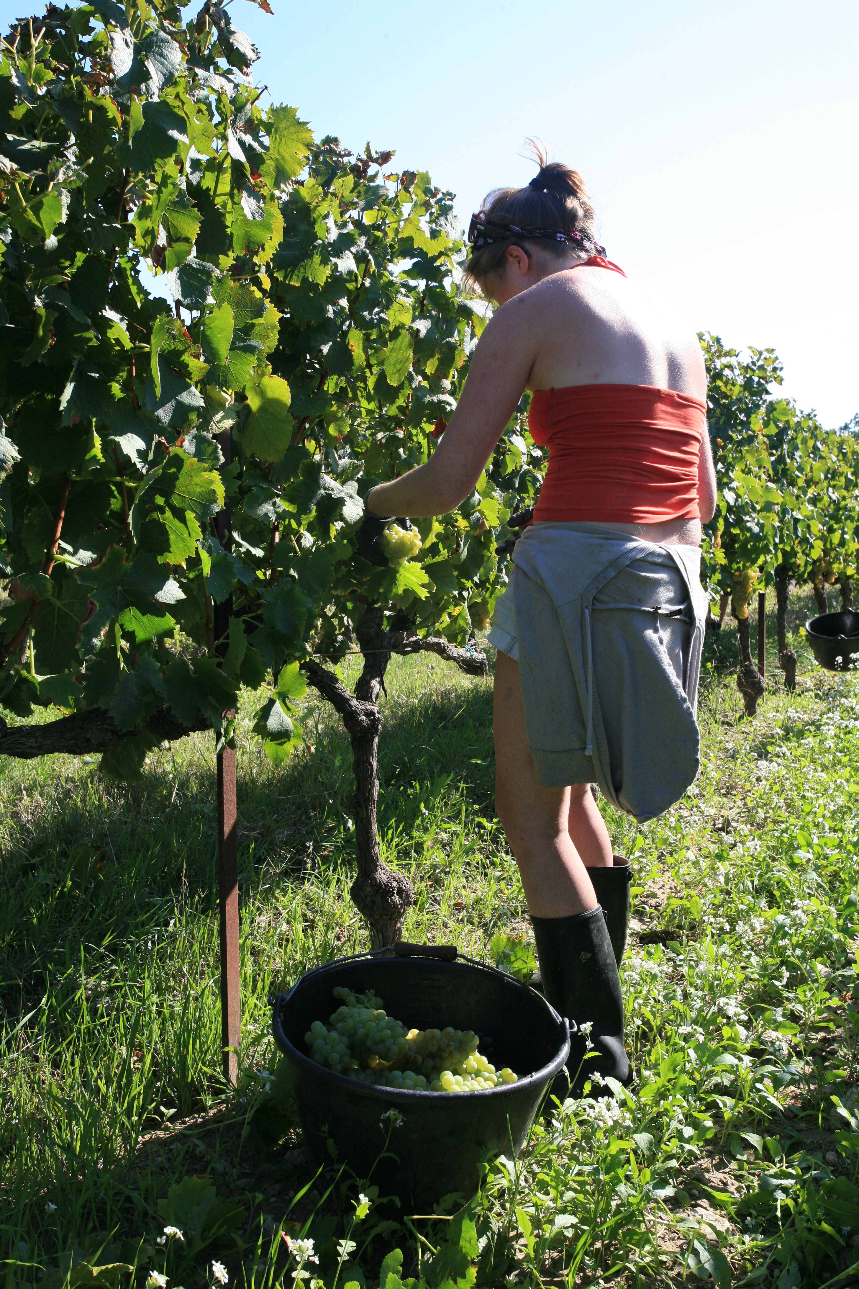 Vendangeuse à Beaumes-de-Venise, Vaucluse, France